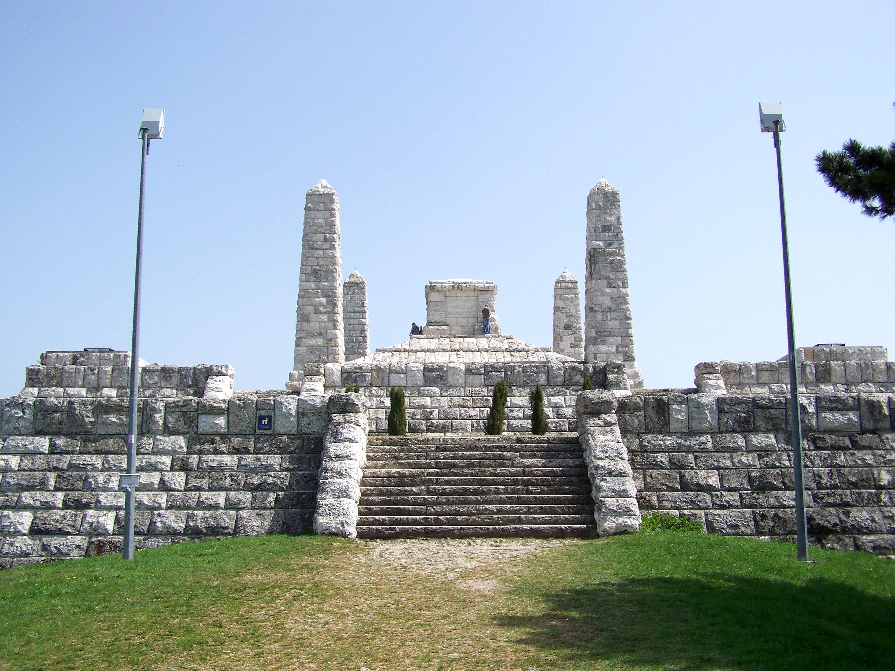 Pamätník